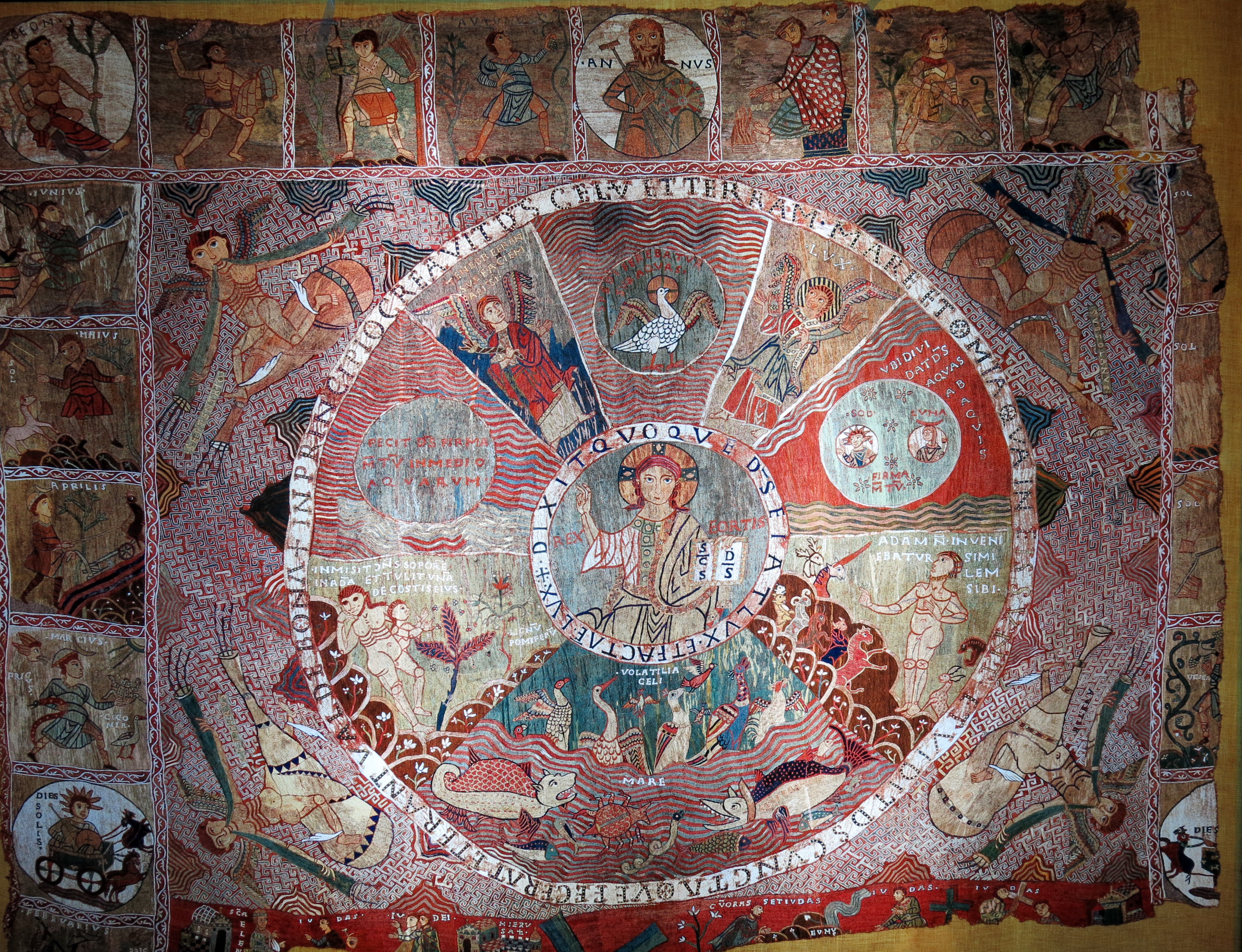 Magatzems generals del Dipòsit (Barcelona). Inclouen el Museu d'Història de Catalunya